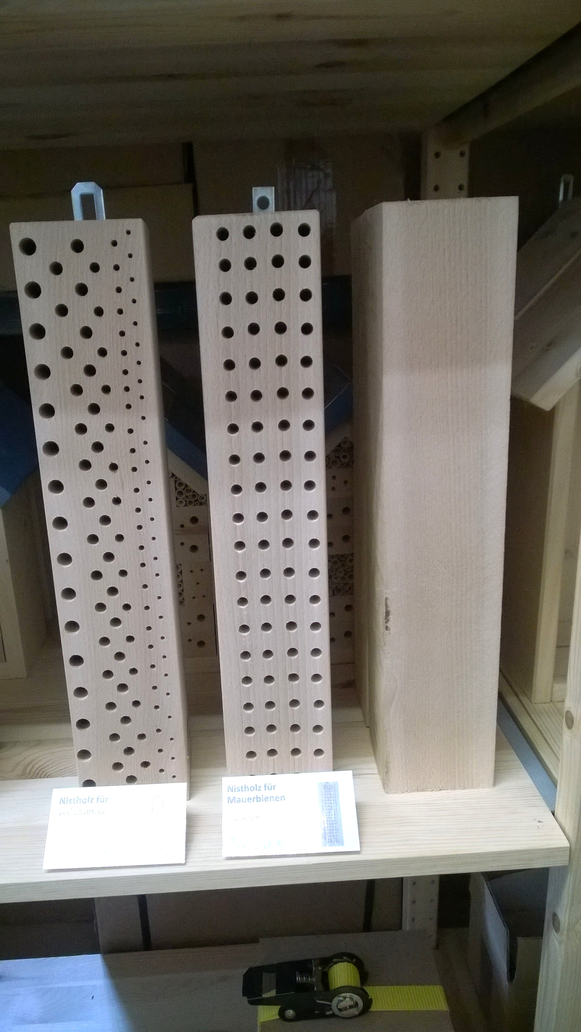 Verschiedene Insektenhotels der professionelle Bauweise im Naturschutzcenter Stuttgart.